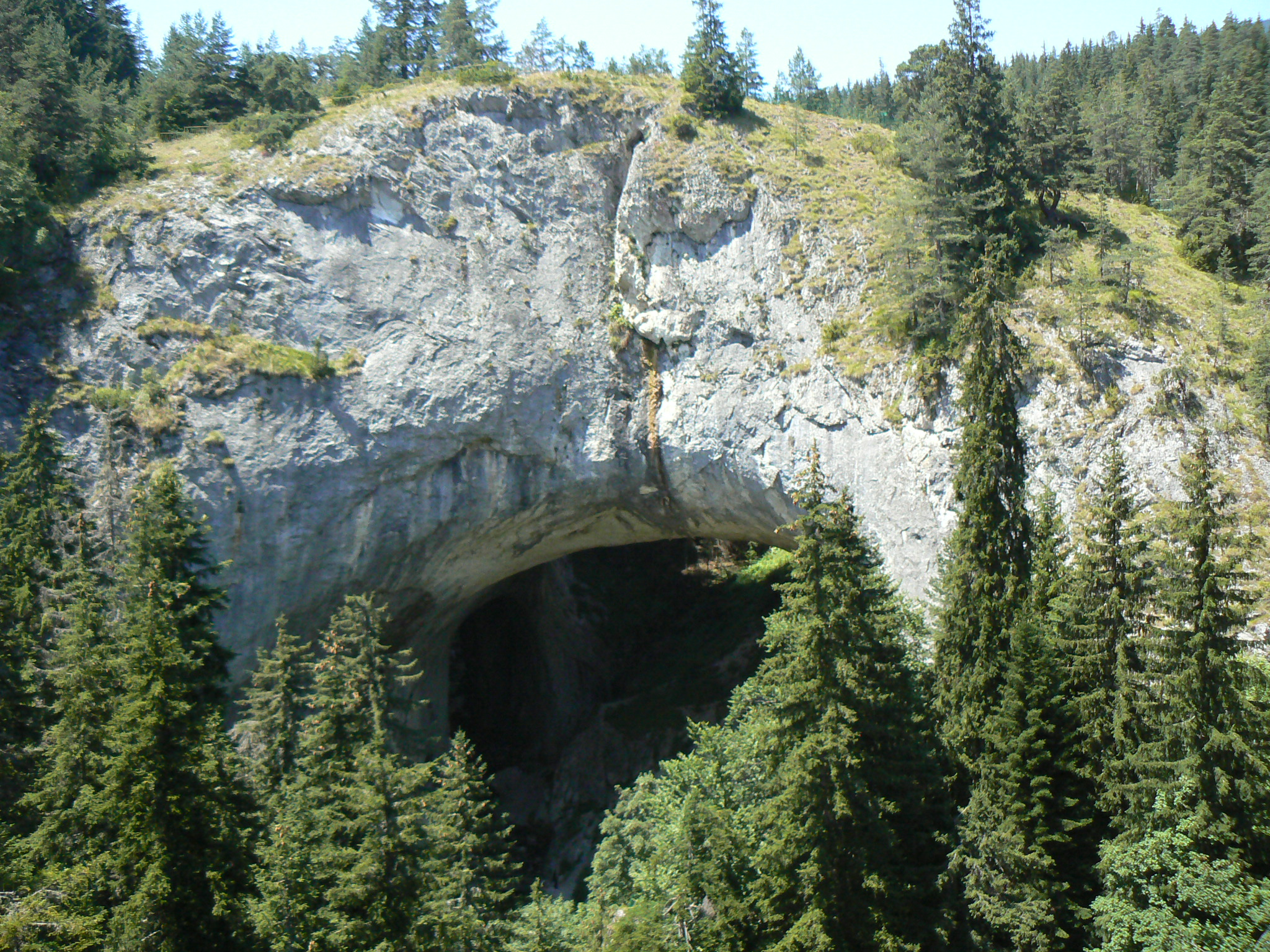 Natural rock phenomenon the Wonderful Bridges in the Rhodope mountain, Bulgaria - view to the large bridge. Природен скален феномен Скалните мостове в Родопа планина, България - поглед към големия мост.